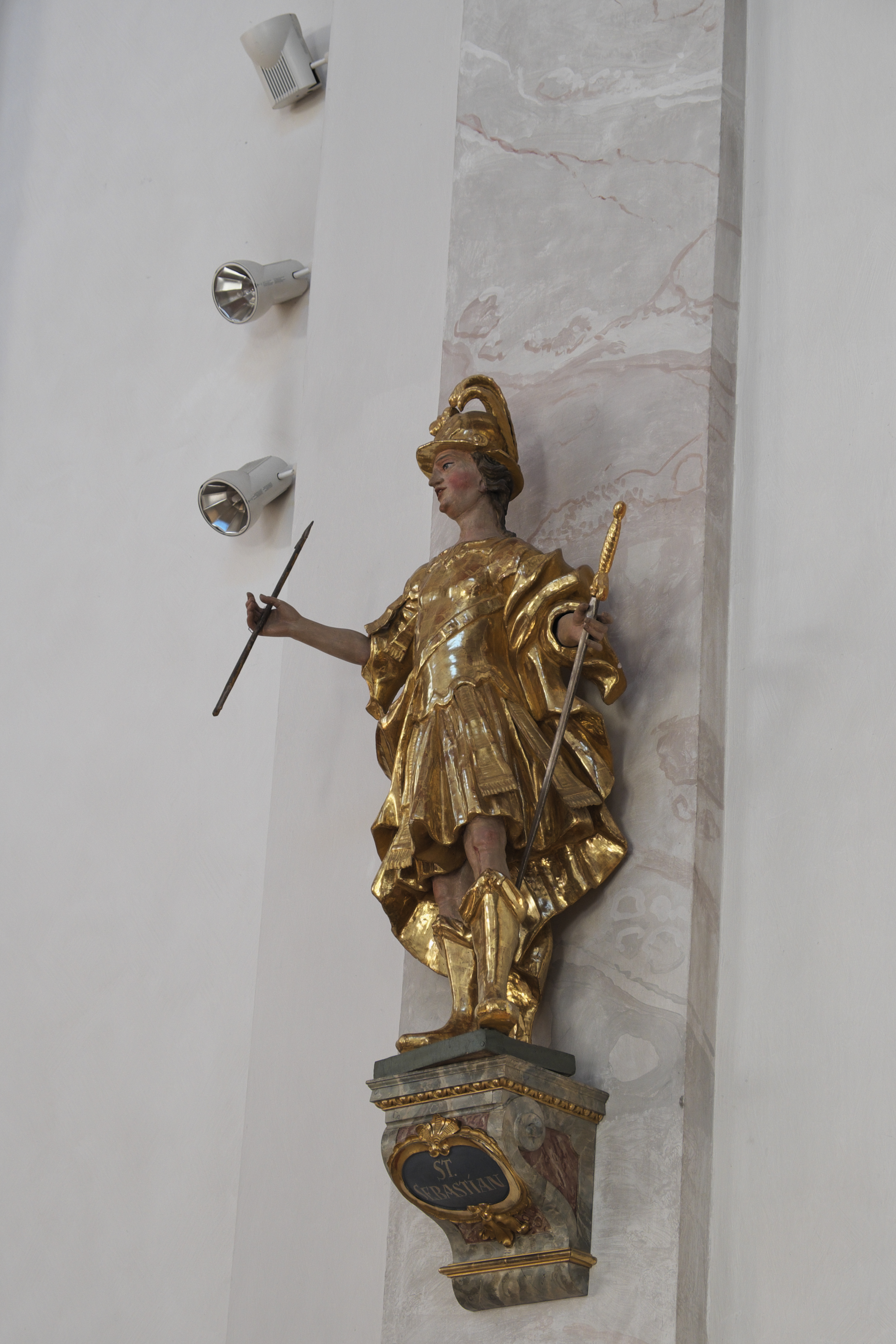 Katholische Pfarrkirche St. Martin in Waging am See im Landkreis Traunstein (Bayern/Deutschland), heiliger Sebastian